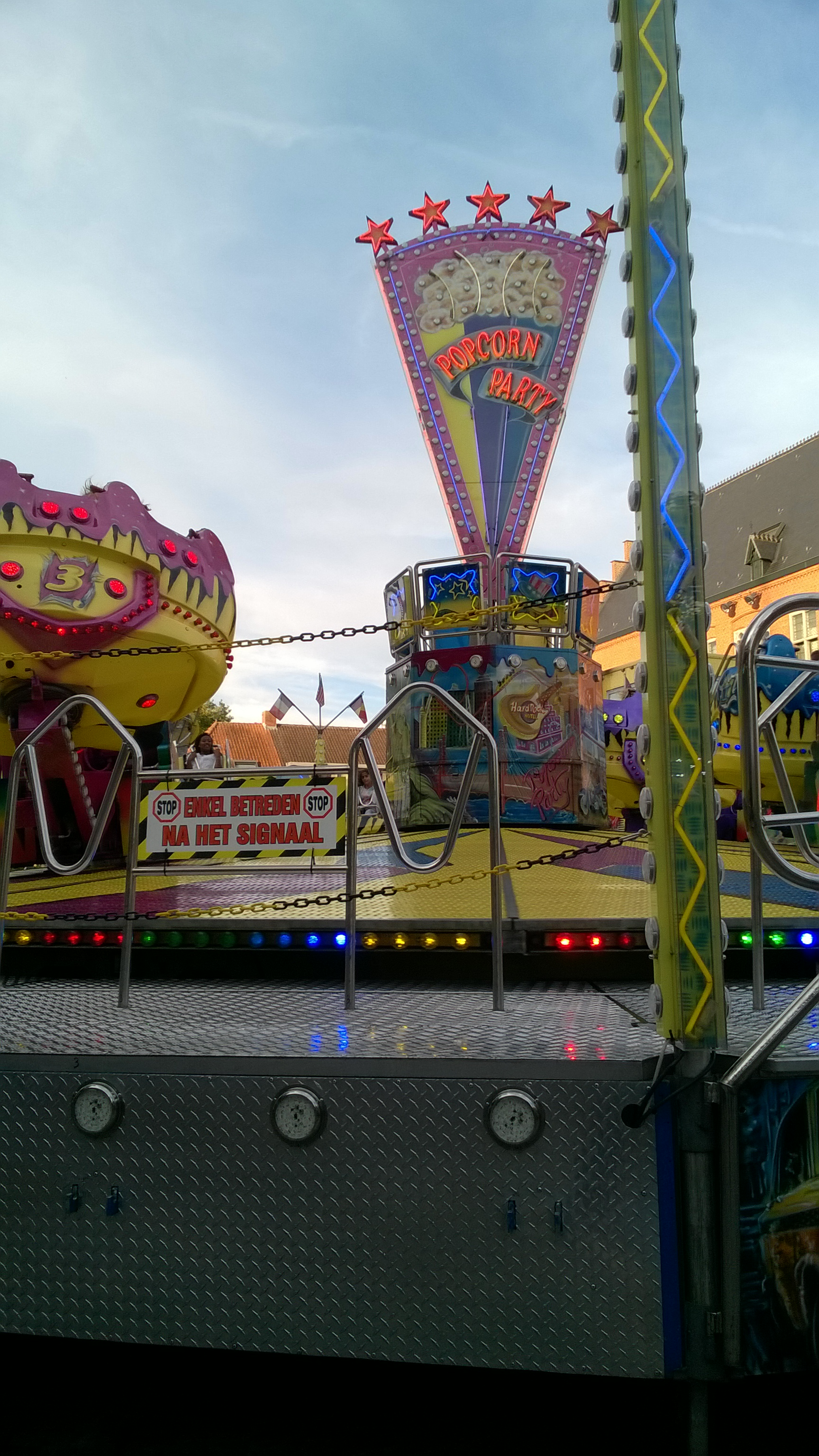 popcorn party in maldegem